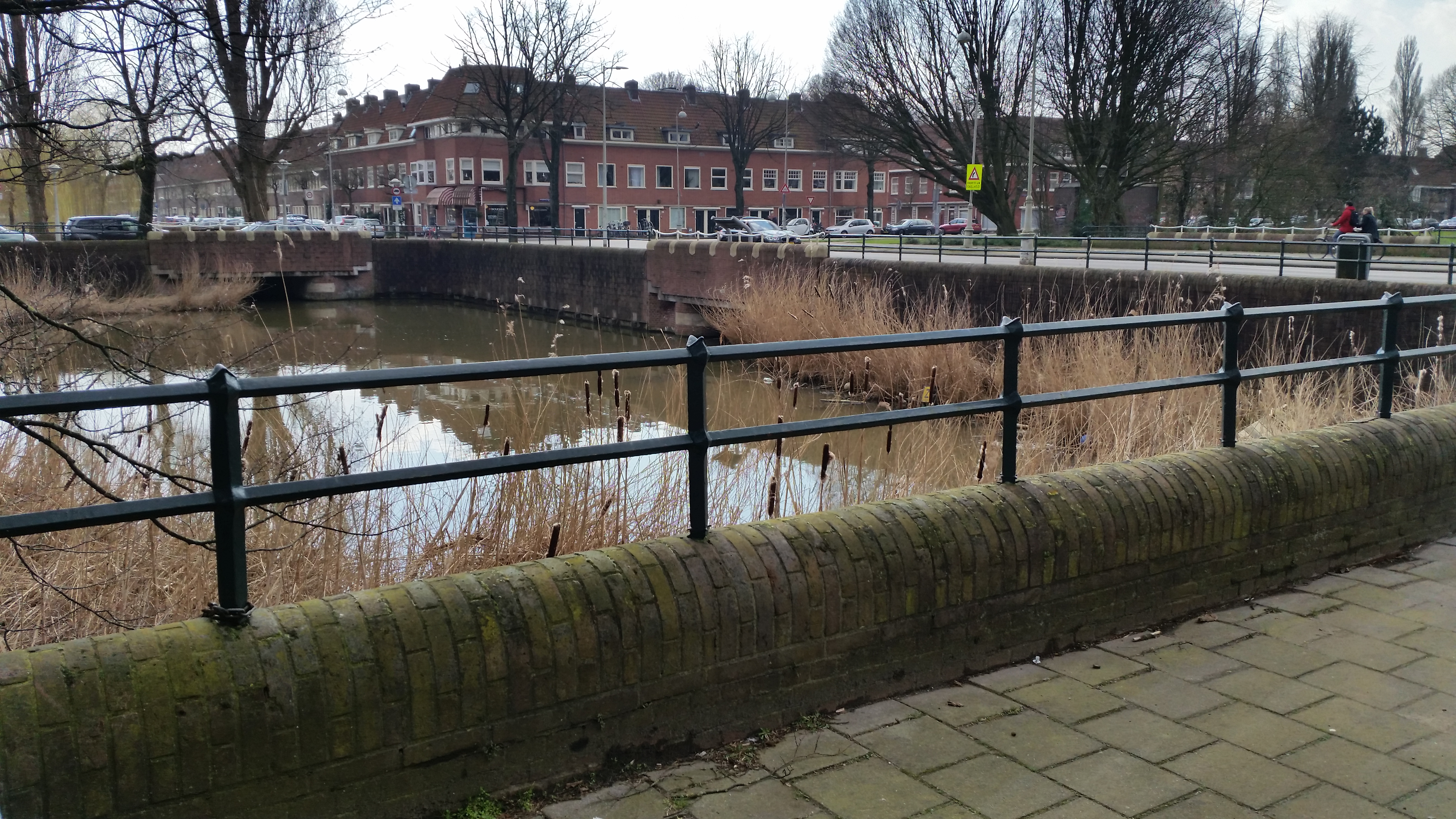 Impressie van Brug 336 (rechts) en Brug 337 (links) in het Galileïplantsoen over de Molenwetering, Amsterdam-Watergraafsmeer (maart 2020)